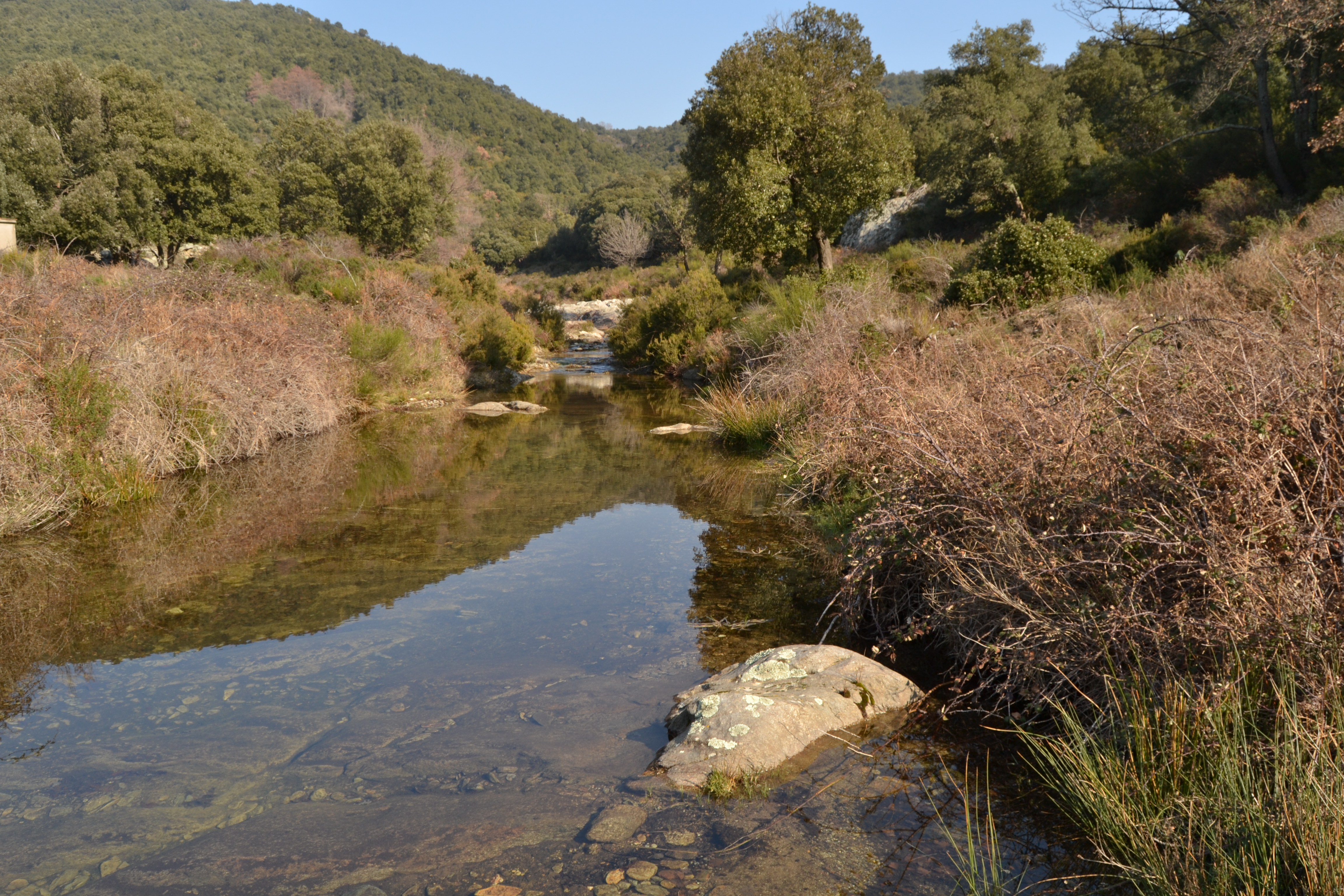 El Llobregat d'Empordà gairebé a la seva capçalera al municipi de La Jonquera